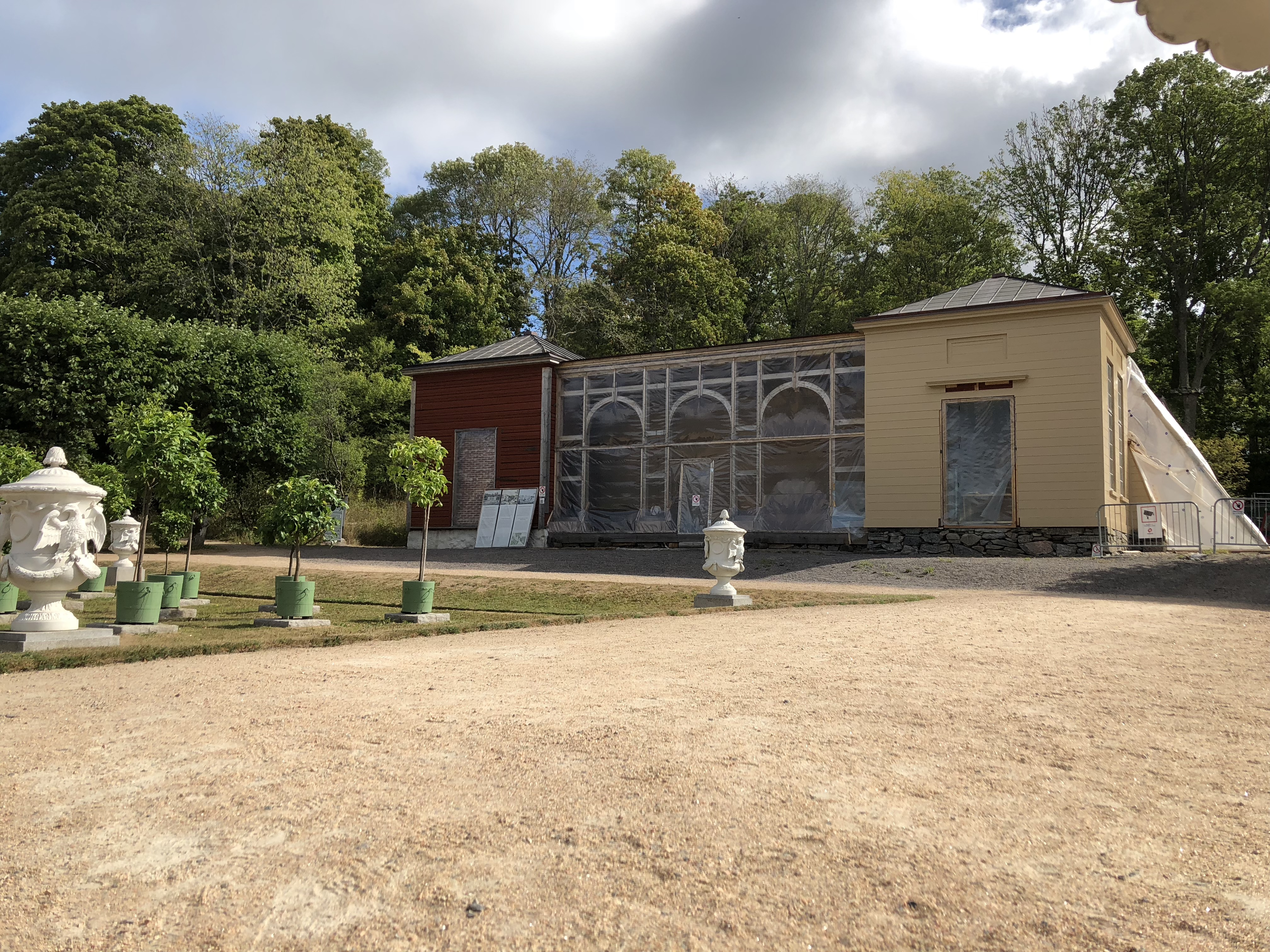 Gunnebo slotts orangeri under uppbyggnad, 4 augusti 2018.